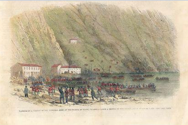 Dipinto che raffigura lo sbarco dei Mille, il 22 agosto 1860, sulla spiaggia della Marina di Palmi